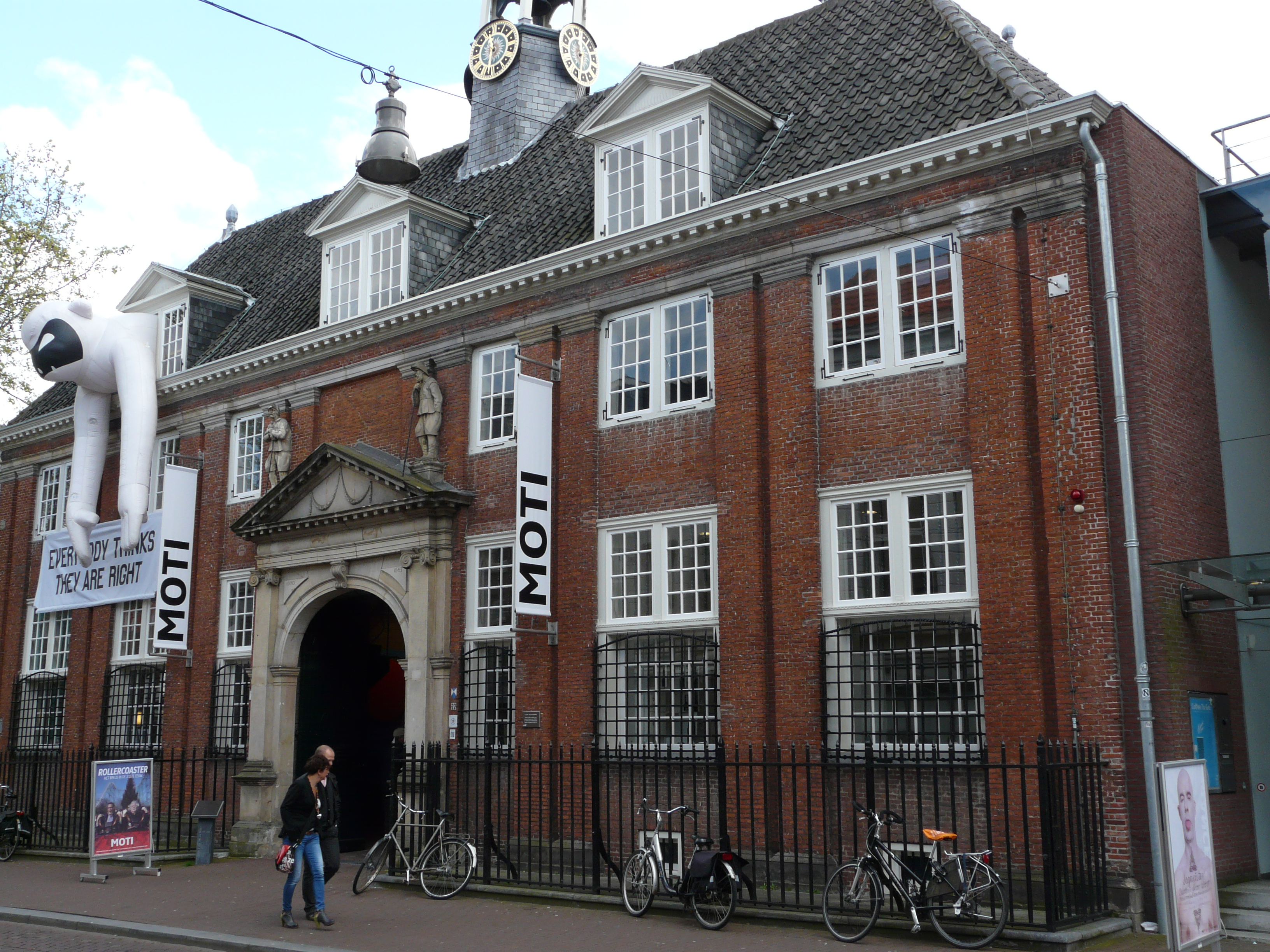 Zicht op een deel van het voormalige Museum of the Image, MOTI Breda, gevestigd in de Boschstraat 22, in het centrum van Breda